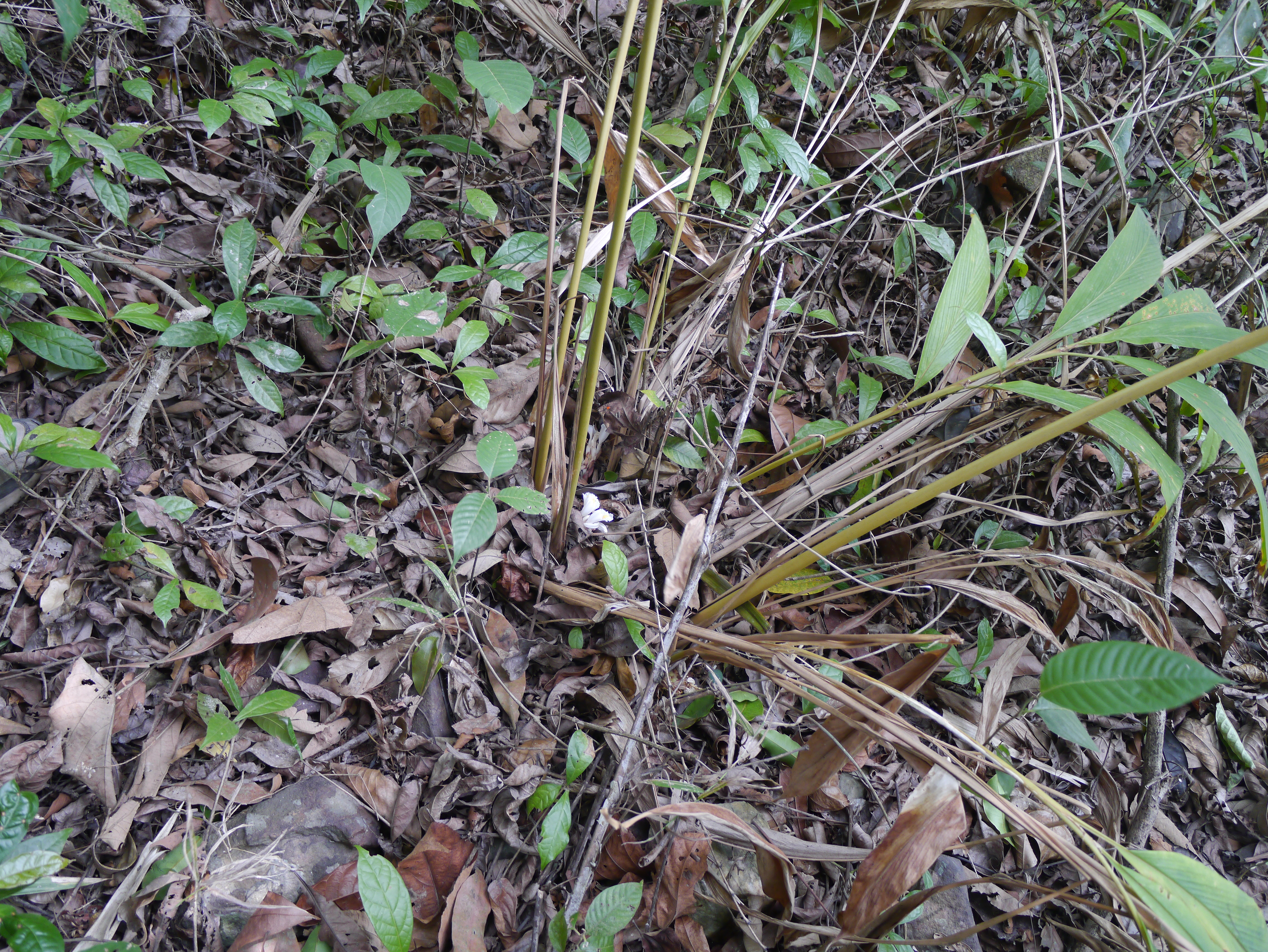 Amomum pterocarpum